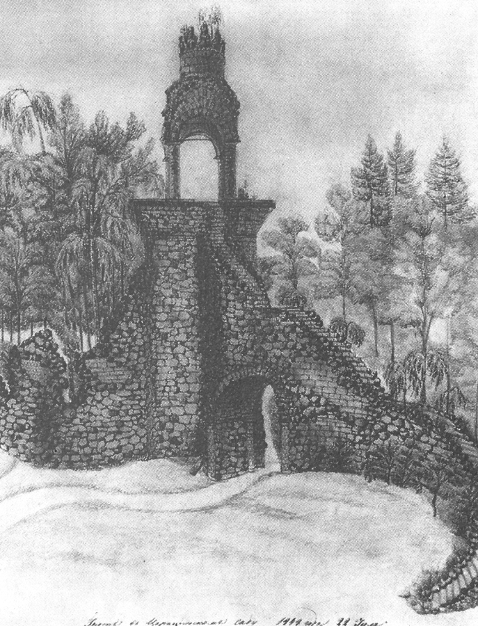 Башня-руина в Царицынском парке. Рисунок 1848 года